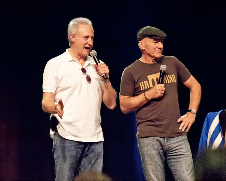 _DSC9595-1